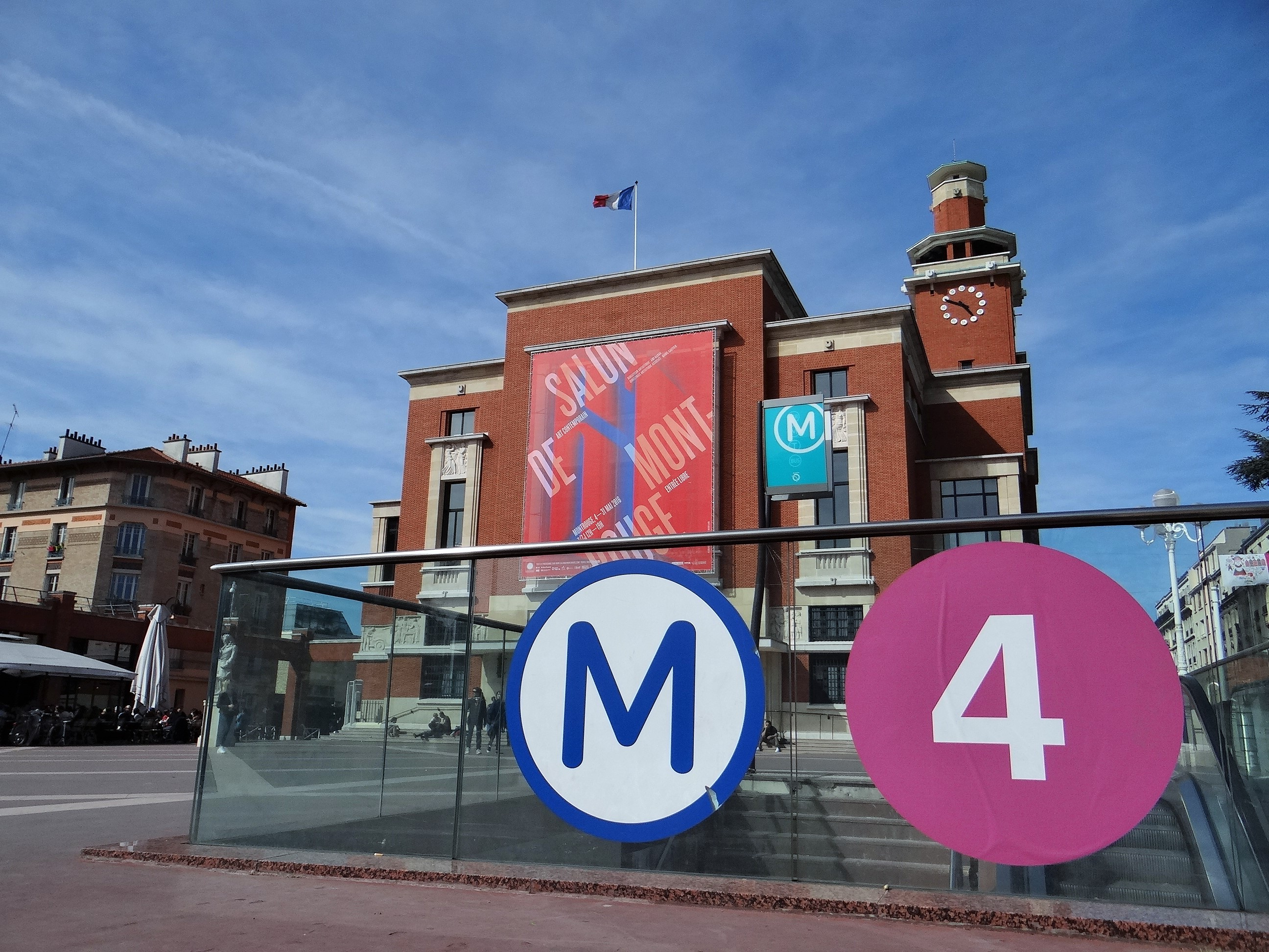 Sortie place Émile Cresp de la station Mairie de Montrouge avec le Beffroi en arrière plan